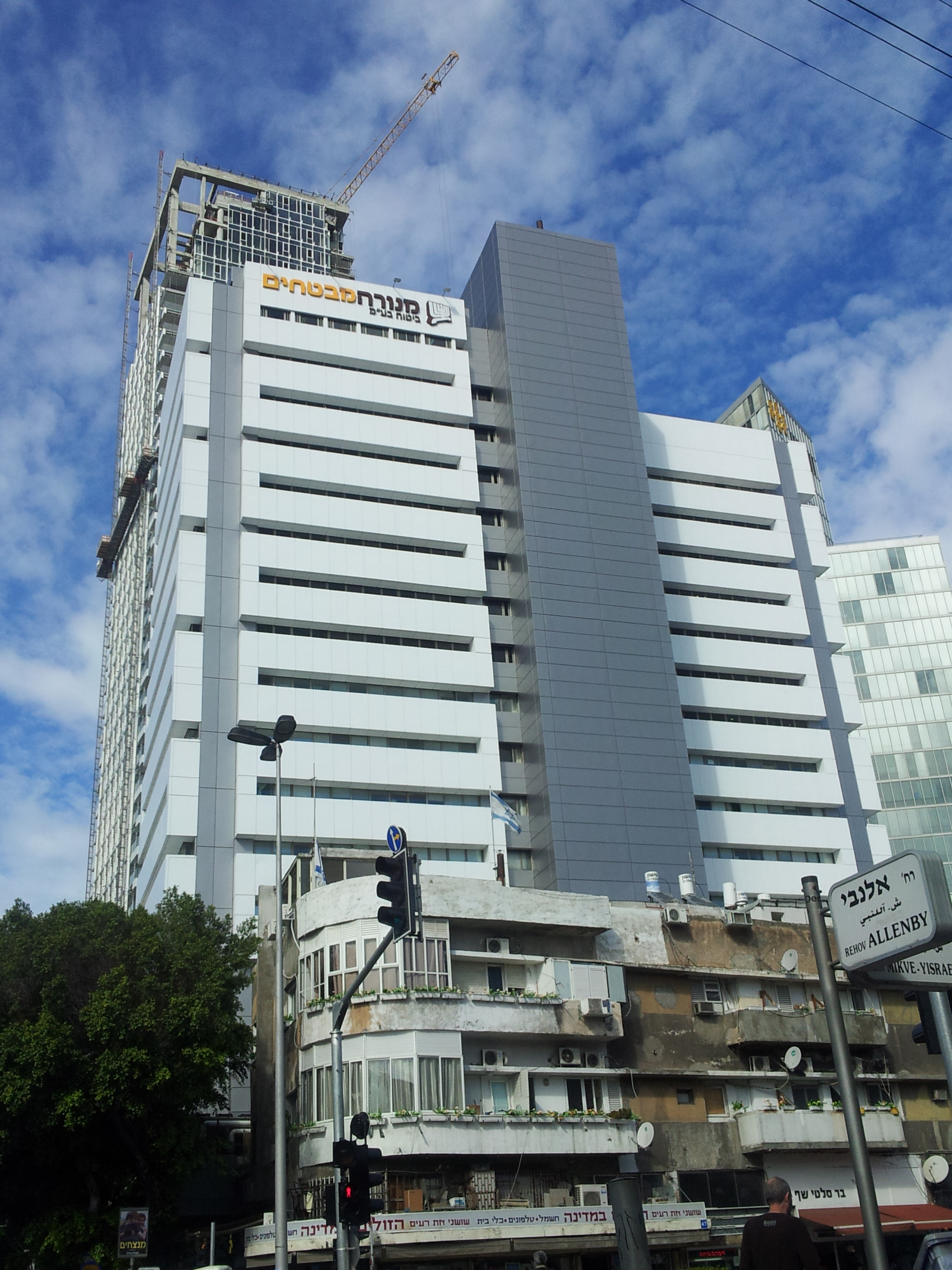 בית הסנה